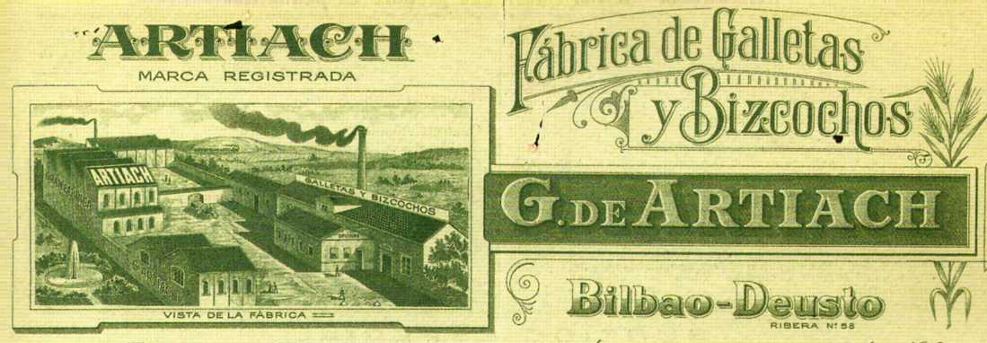 membrete documento